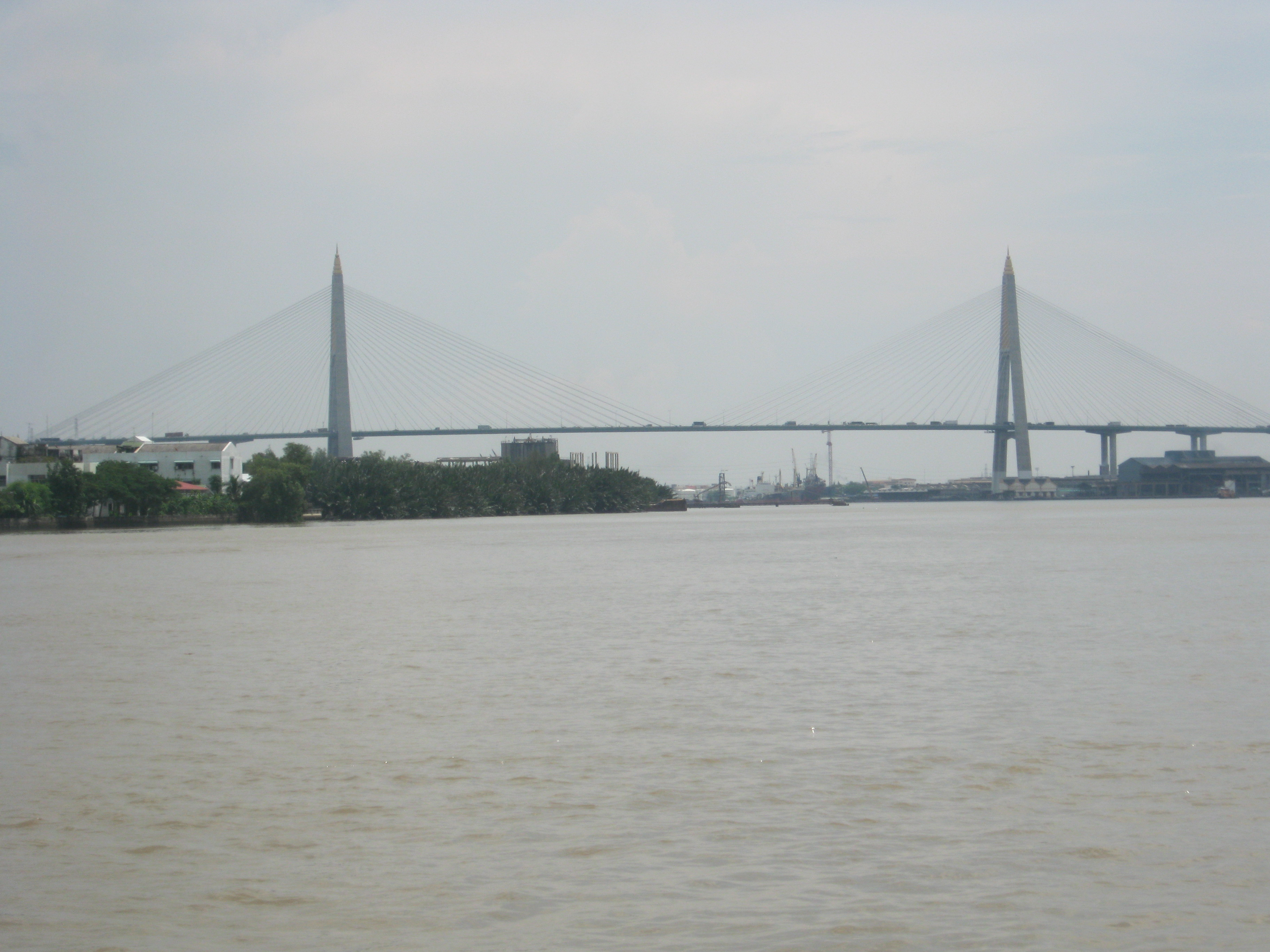 Kanchanaphisek Bridge